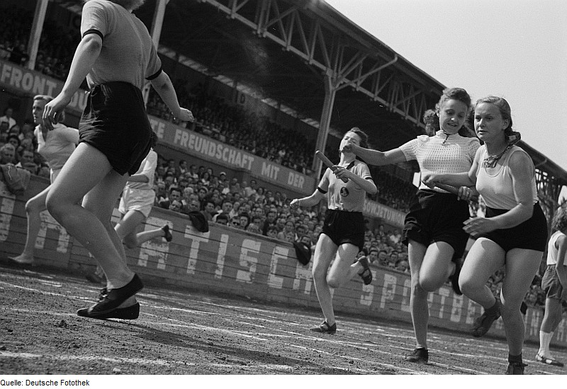 Original image description from the Deutsche FotothekLäuferinnen beim Weiterreichen des Staffelstabes